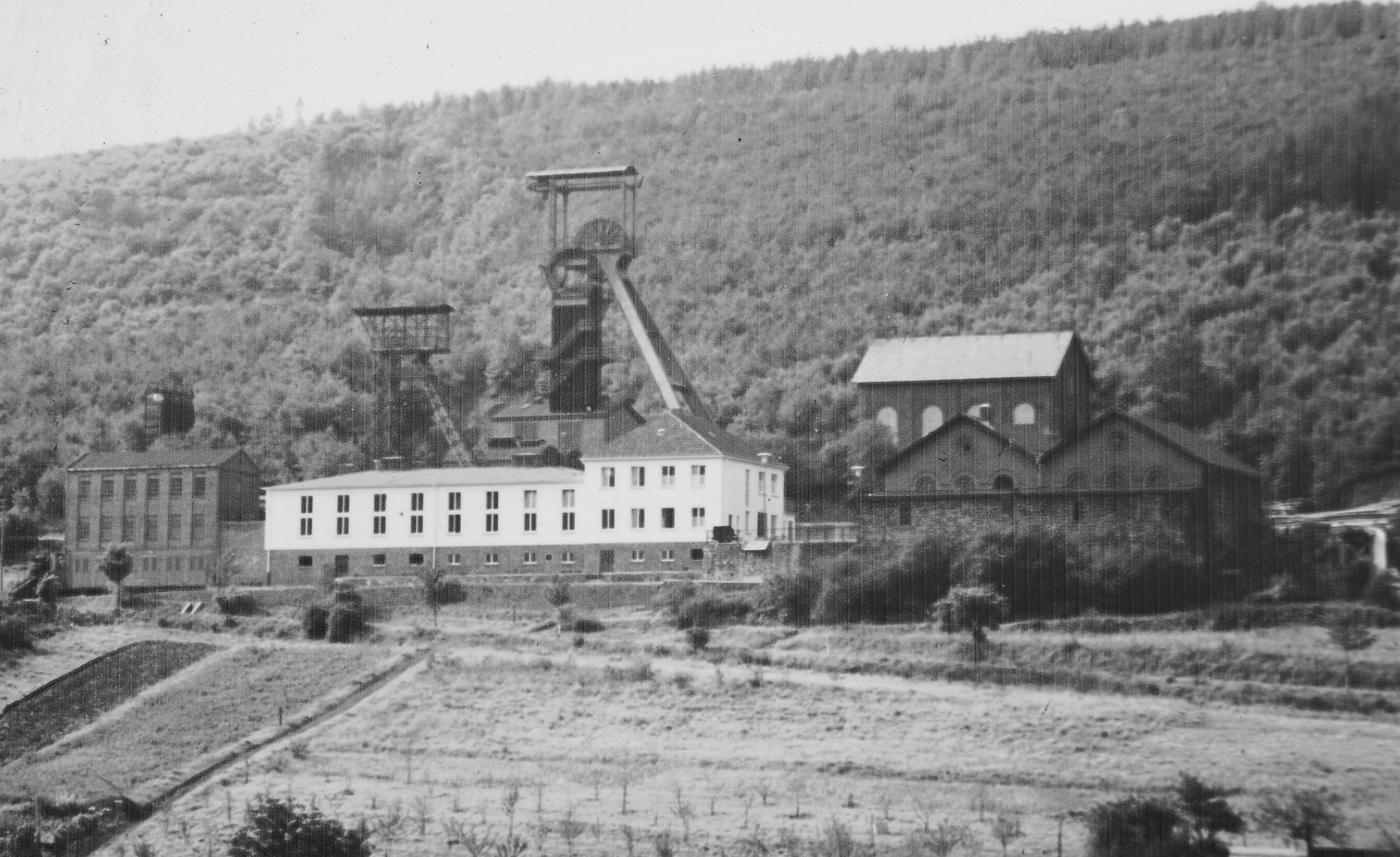 Grube Füsseberg - Friedrich Wilhelmː Anlagen der Grube Friedrich Wilhelm in Herdorf um 1955.